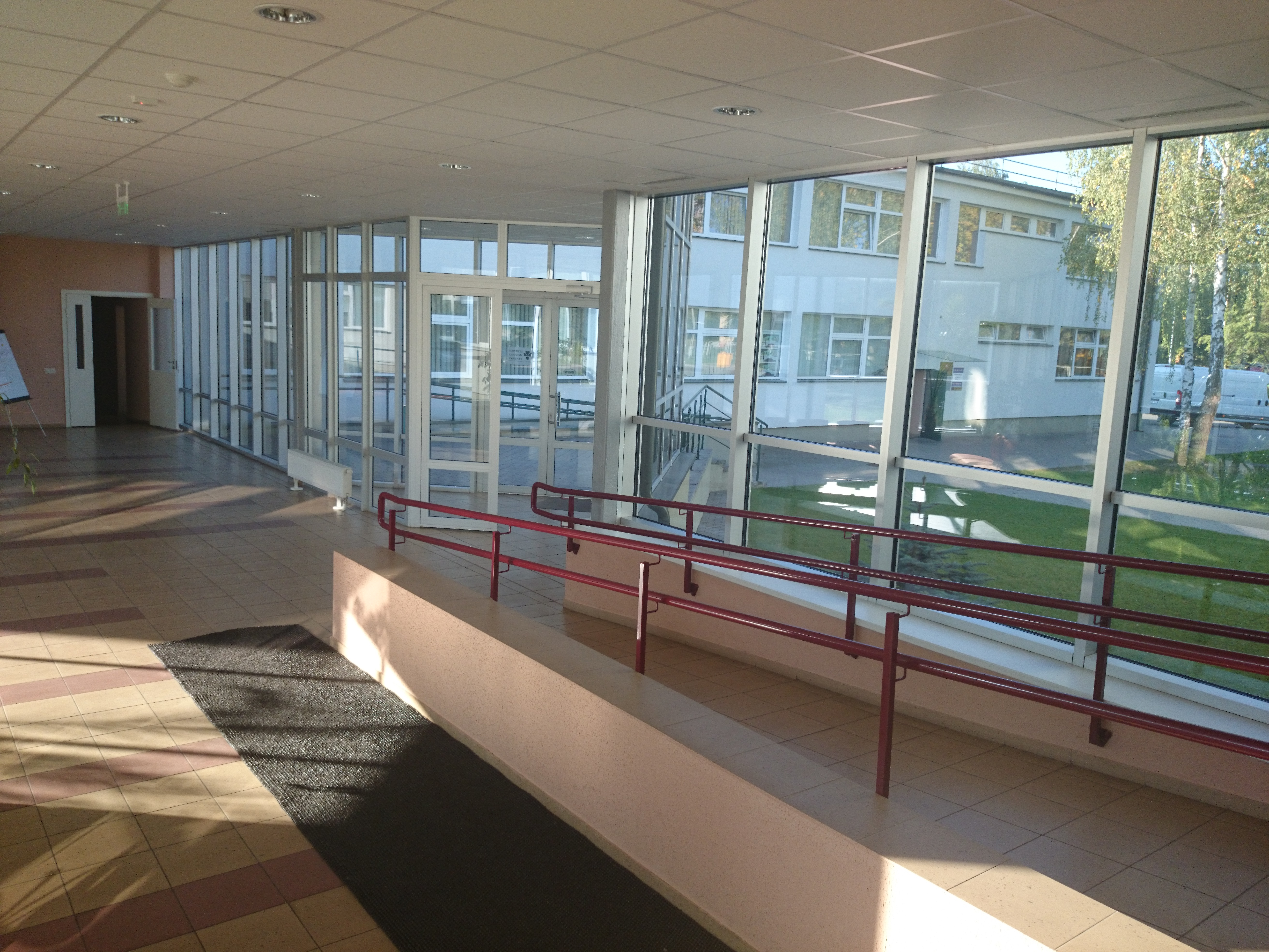 Achemos mokymo centras